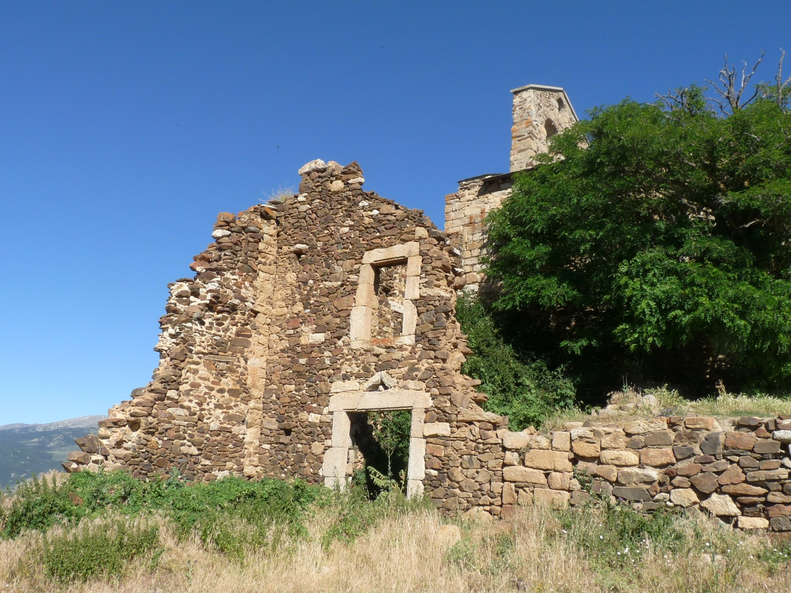 Bâtiment attenant, Chapelle du Belloc, Dorres, Pyrénées-Orientales, France